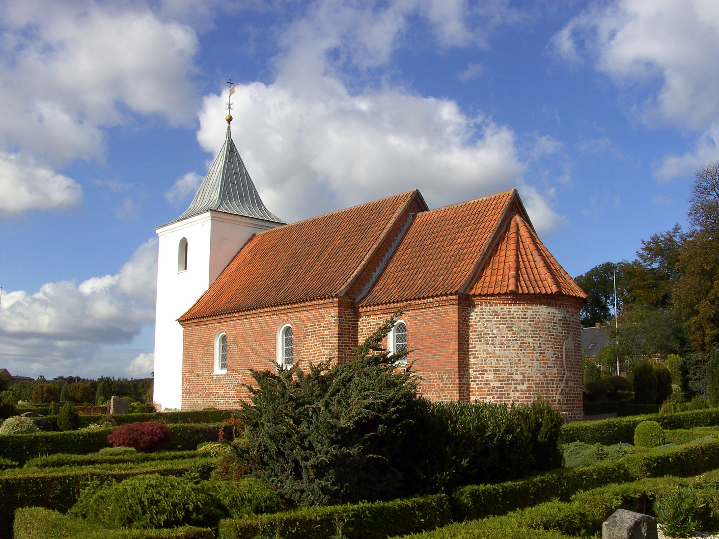 fra sydøst